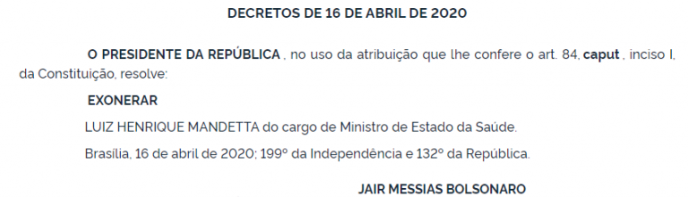 Decreto presidencial de exoneração de Luiz Henrique Mandetta do cargo de Ministro de Estado da Saúde do Brasil.